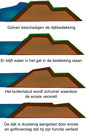 De effecten van erosie op een dijk schematisch weergegeven 1=Golven beschadigen de dijkebedeking. 2=Er blijft water in het gat in de bedekking staan. 3=Het buitentalud wordt schuiner waardoor de erosie versnelt. 4=De dijk is dusdaning aangetast door erosie en golfoverslag dat hij zijn functie verliest.